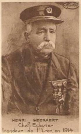 L'éclusier Henri GEERAERT qui lors de la guerre 14 commanda adroitement les écluses de l'Yser pour inonder le sol belge et stopper l'avancée des troupes allemandes.